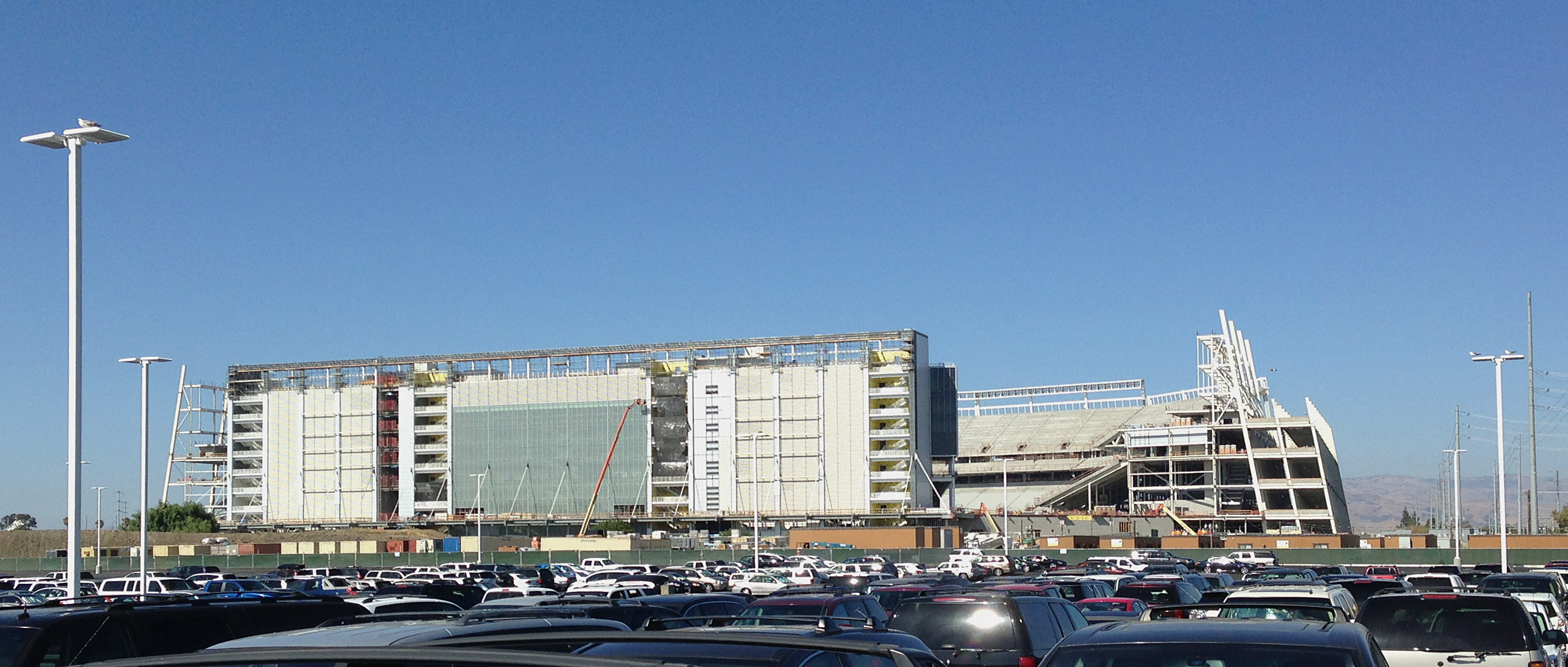 Levi's Stadium